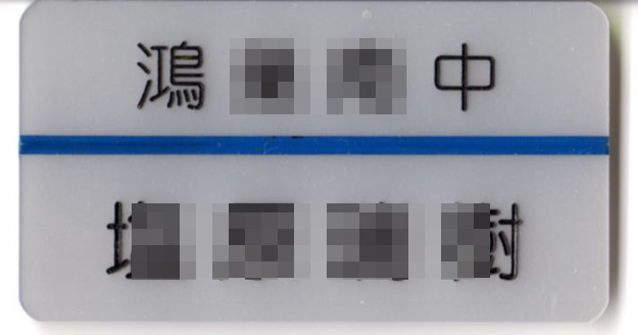 中学校で用いられるプラスチック名札によくあるタイプ。この学校の名札は、白色のプラスチック板(3.0×5.5cm)に学年色(青学年)の青いライン(ほかにも緑学年、赤学年など複数色がある)、上段に学校名 (細字) 、下段に氏名 (太字) が共に丸ゴシック体で彫刻されている。学年色は入学から卒業まで不変のため、卒業まで3年間使用し続ける。写真は安全ピンタイプだが、学ラン（男子）やブレザー（女子）に使用するための、４隅に小孔が開いており、糸縫いで付けるものもある。